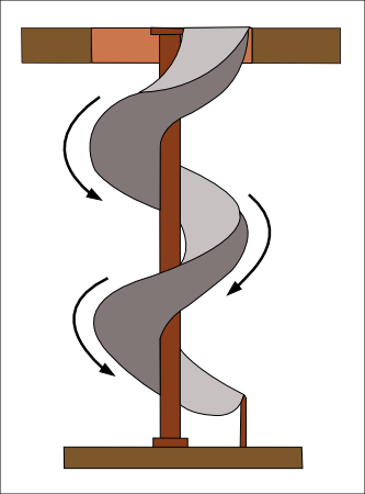 Schema einer Wendelrutsche